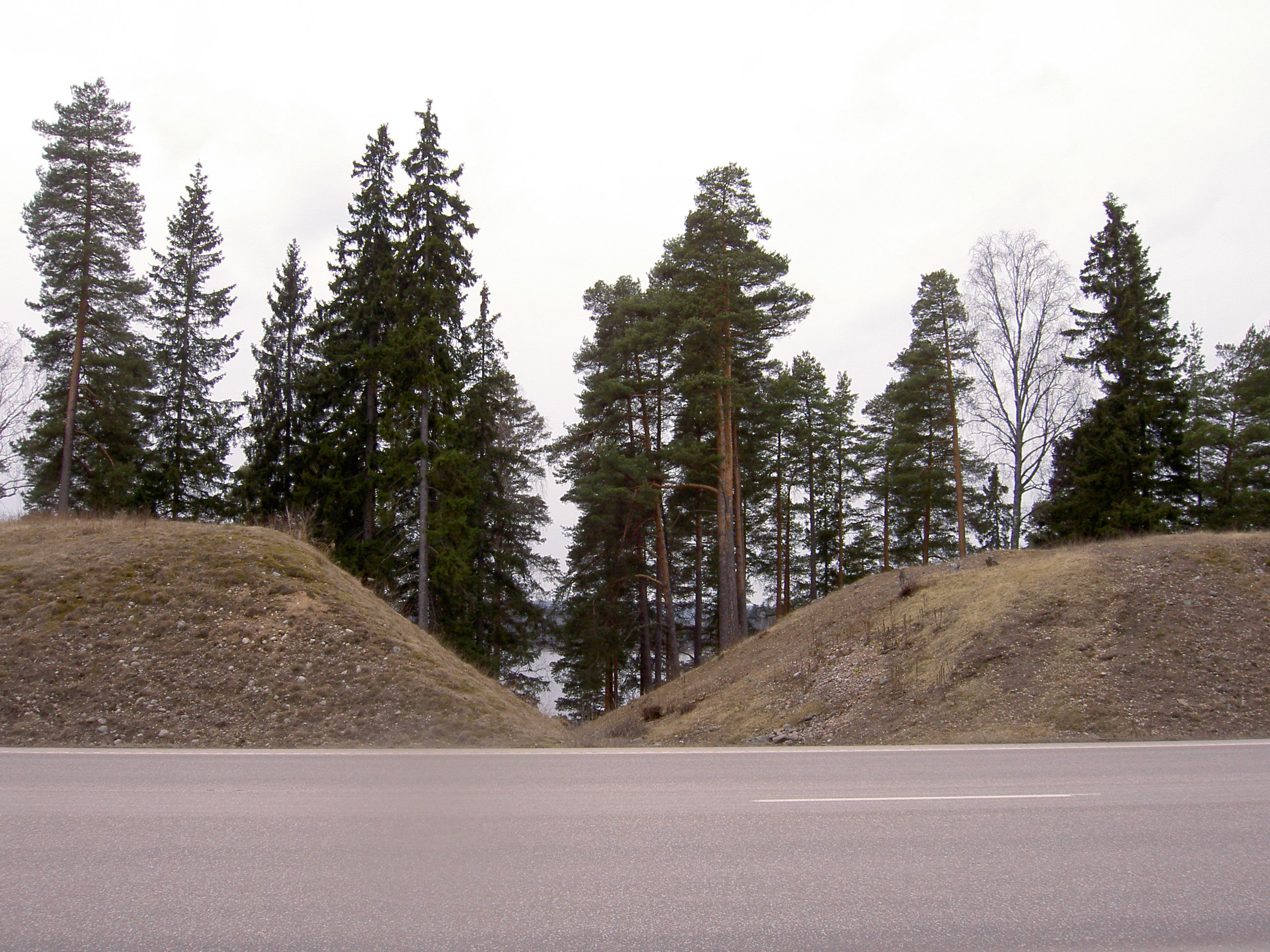 Vallgrav mellan två av kullarna som utgjorde den medeltida fogdegården (befästningen) Grådö skans, utanför Hedemora, Dalarnas län.